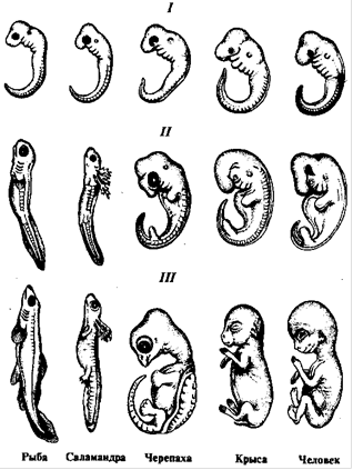 Внутриутробное развитие